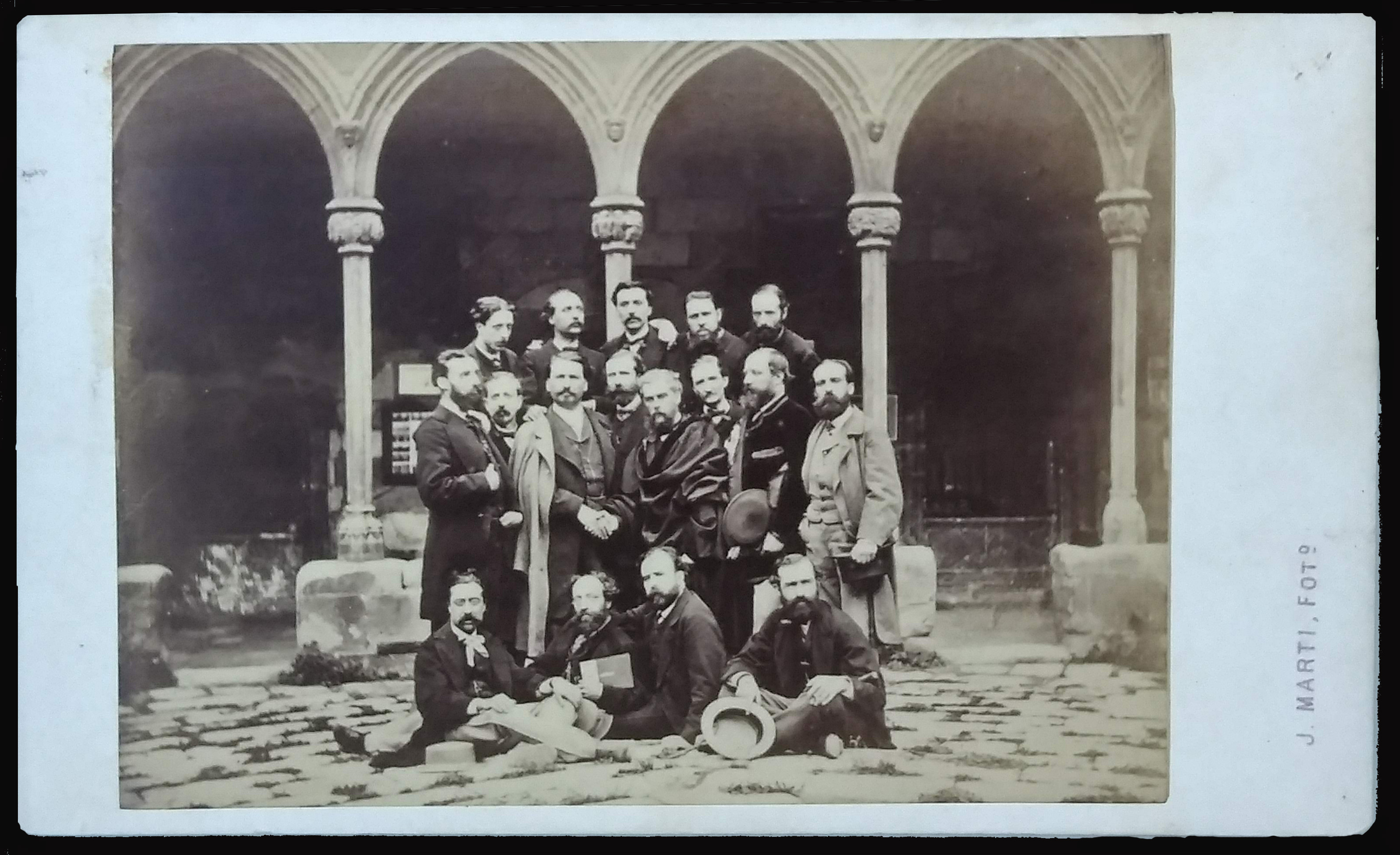 Visita de los felibres e intelectuales de la Renaixença a Montserrat (1868)